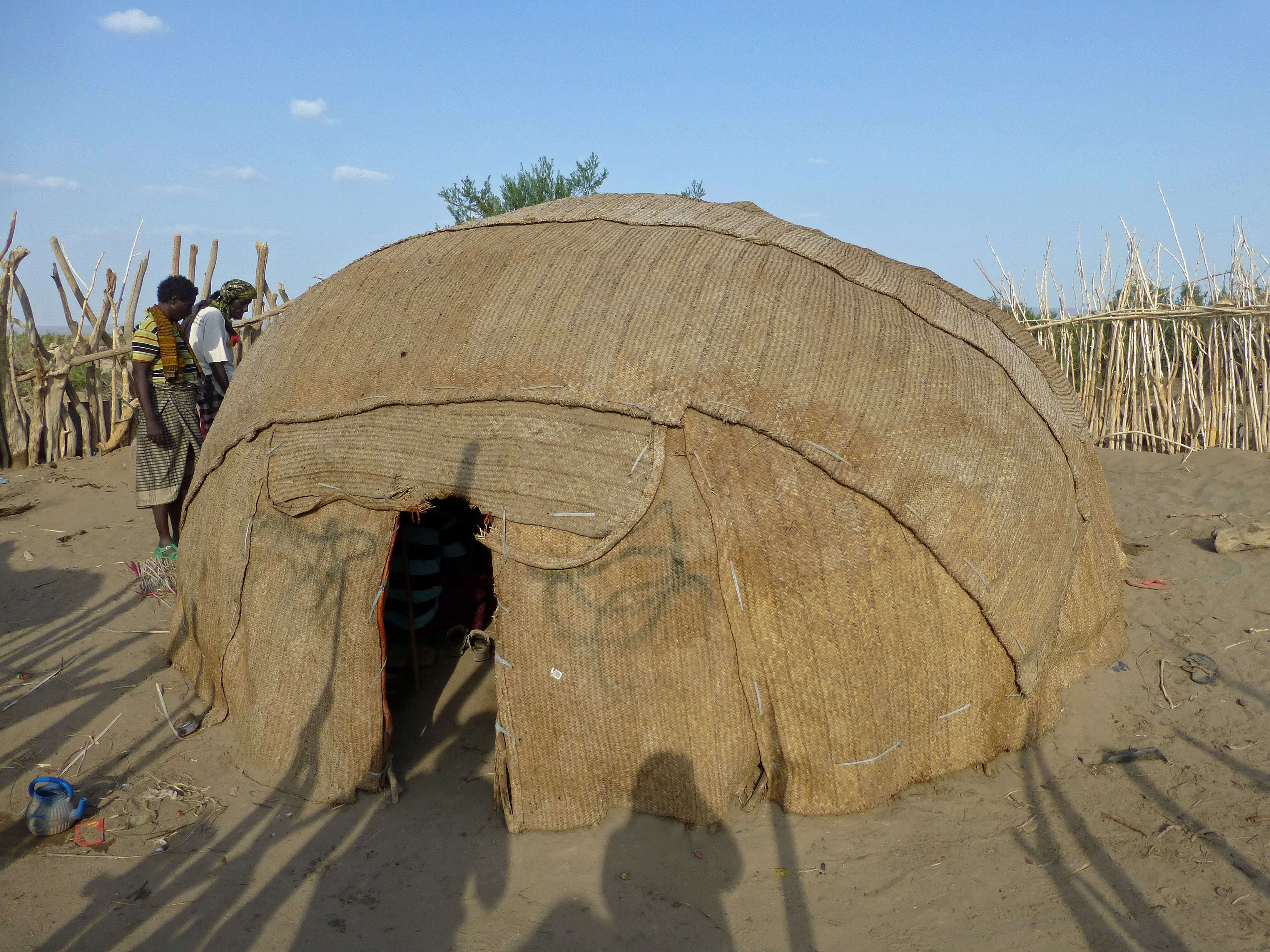 Dodom (Région Afar, Danakil, Ethiopie) : une daboyta, tente traditionnelle Afar ; la tente du chef, passage + ou - obligé pour accéder au volcan Erta Ale.